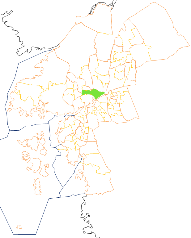 Karta som visar primärområdes belägenhet i Göteborg